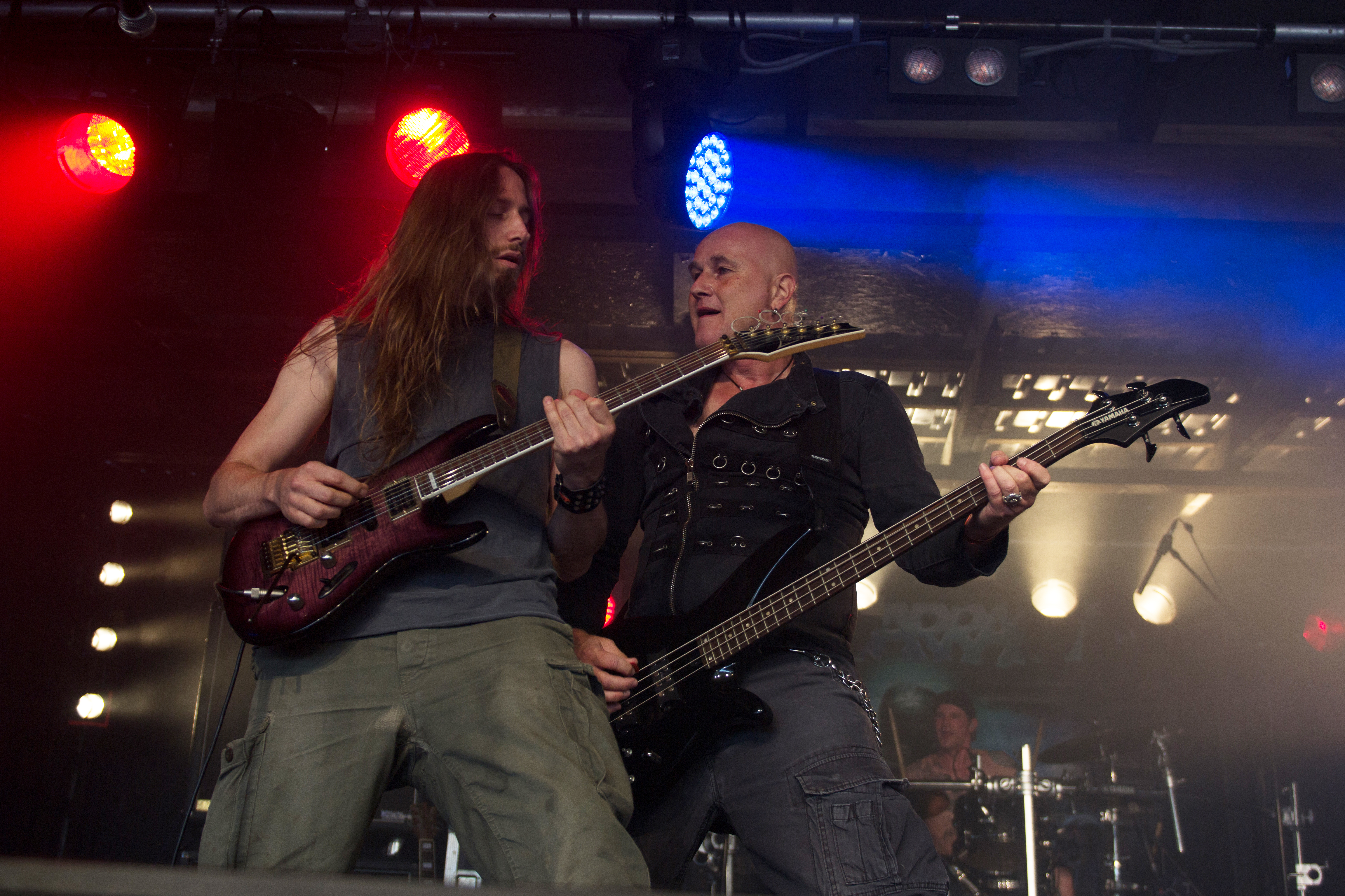 Warrant beim Headbangers Open Air 2017